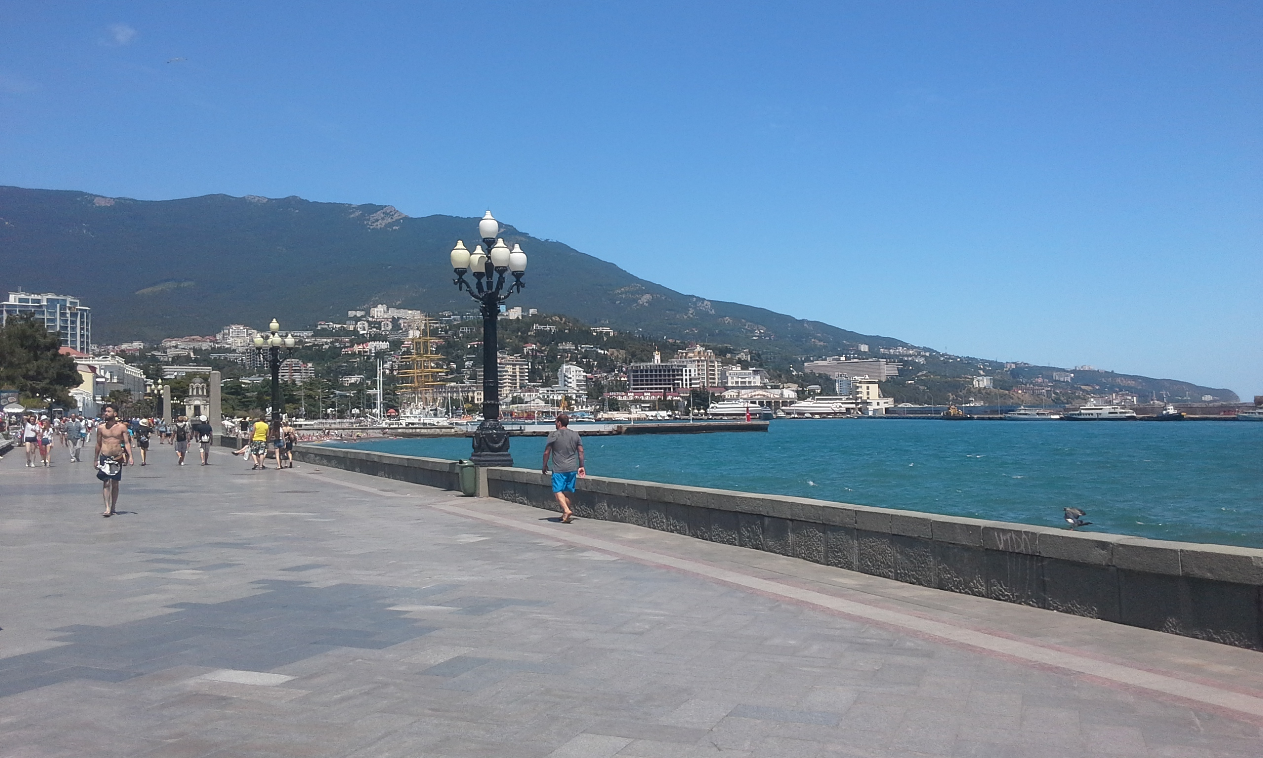 Ялта, Республика Крым, Российская Федерация